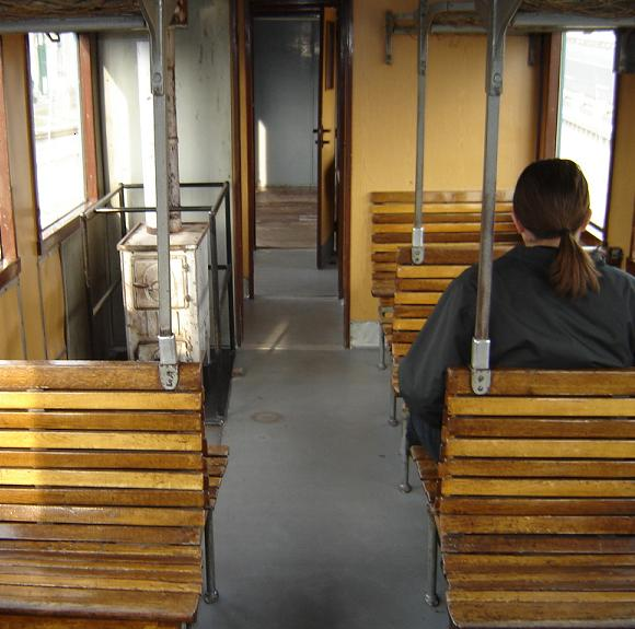 BDa-w személykocsi belülről a Kecskeméti Kisvasúton